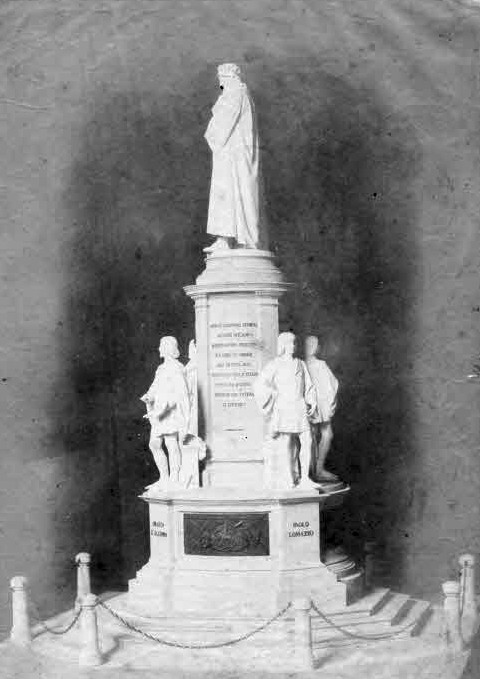 Bozzetto del monumento a Leonardo da Vinci